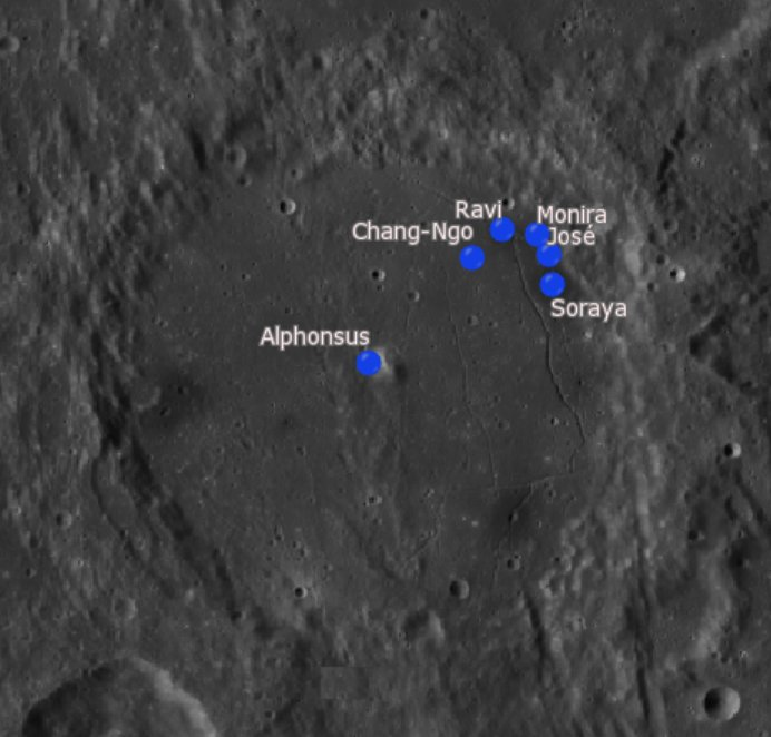 Cráter lunar Alphonsus. Cráteres interiores. (Imagen LRO)